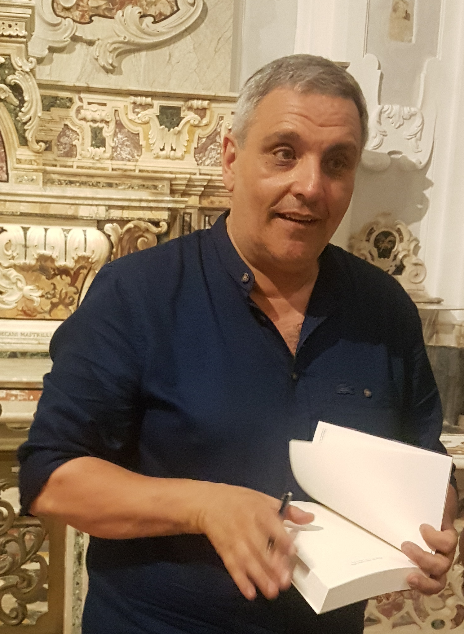 Maurizio De Giovanni alla presentazione del suo libro "Il purgatorio dell'angelo. Confessioni per il commissario Ricciardi". Nola, 4 luglio 2018, Chiesa dei Santi Apostoli